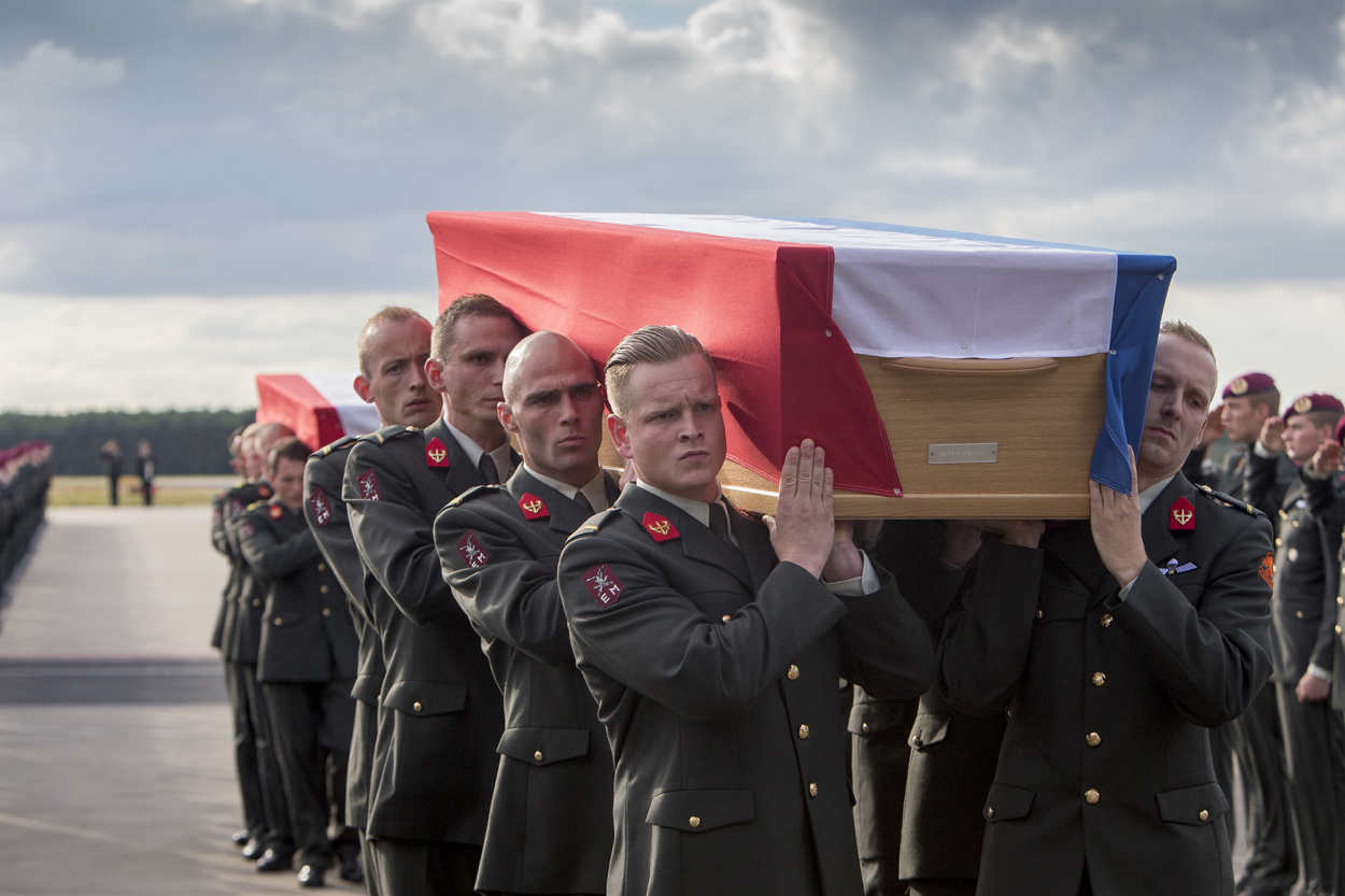 Tijdens een mortierschietoefening in Mali zijn vorige week woensdag 2 collega’s om het leven gekomen. Het zijn de 29-jarige sergeant der eerste klasse Henry Hoving en de 24-jarige korporaal Kevin Roggeveld. Een soldaat der eerste klasse van 23 jaar raakte zwaargewond.